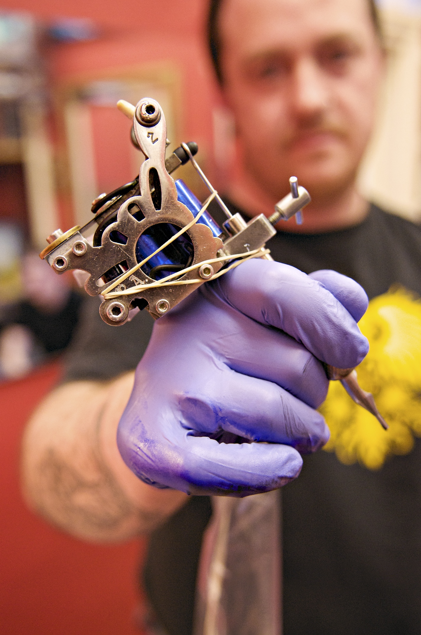 Tattoo gun